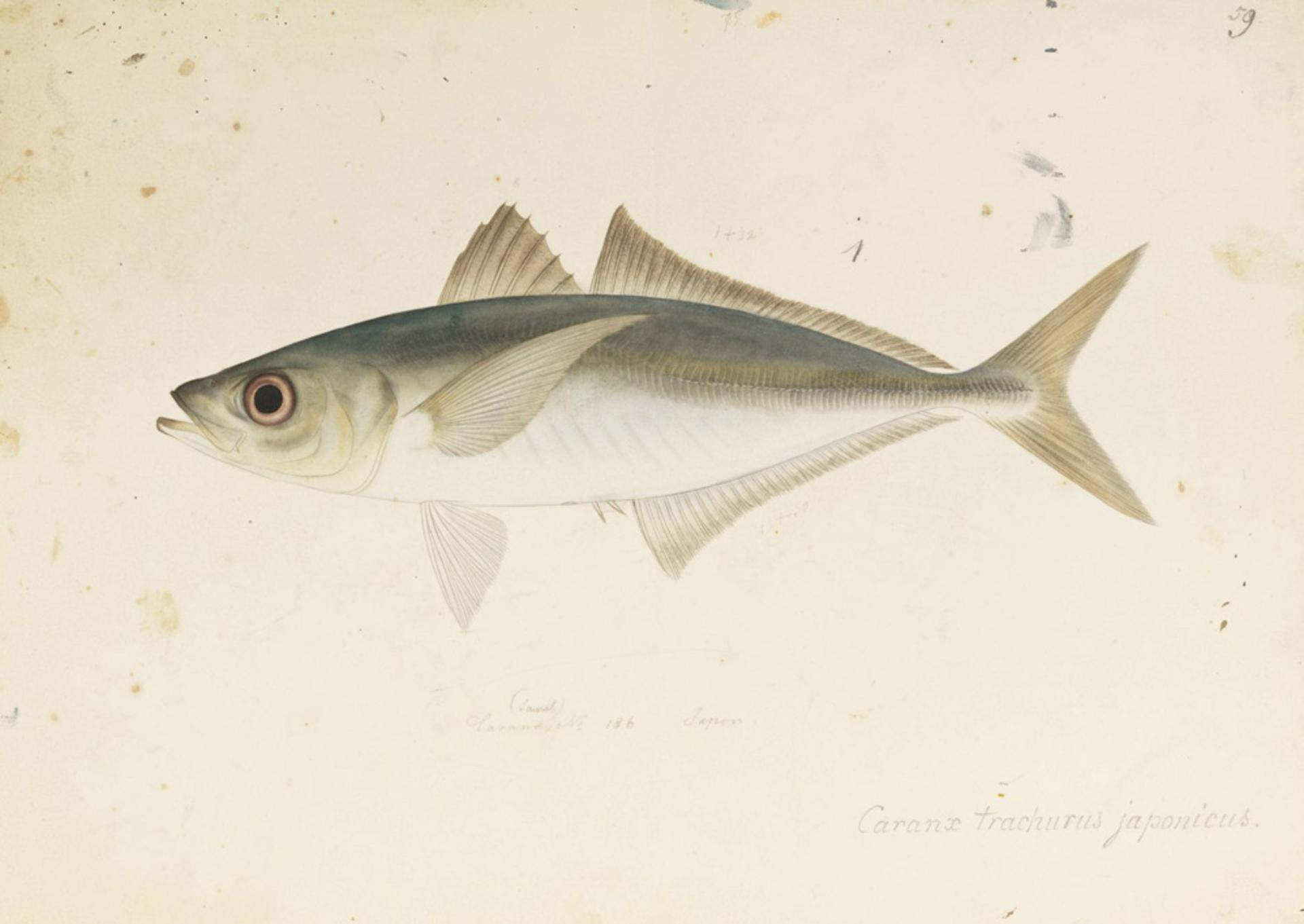 Trachurus japonicus (Temminck and Schlegel)